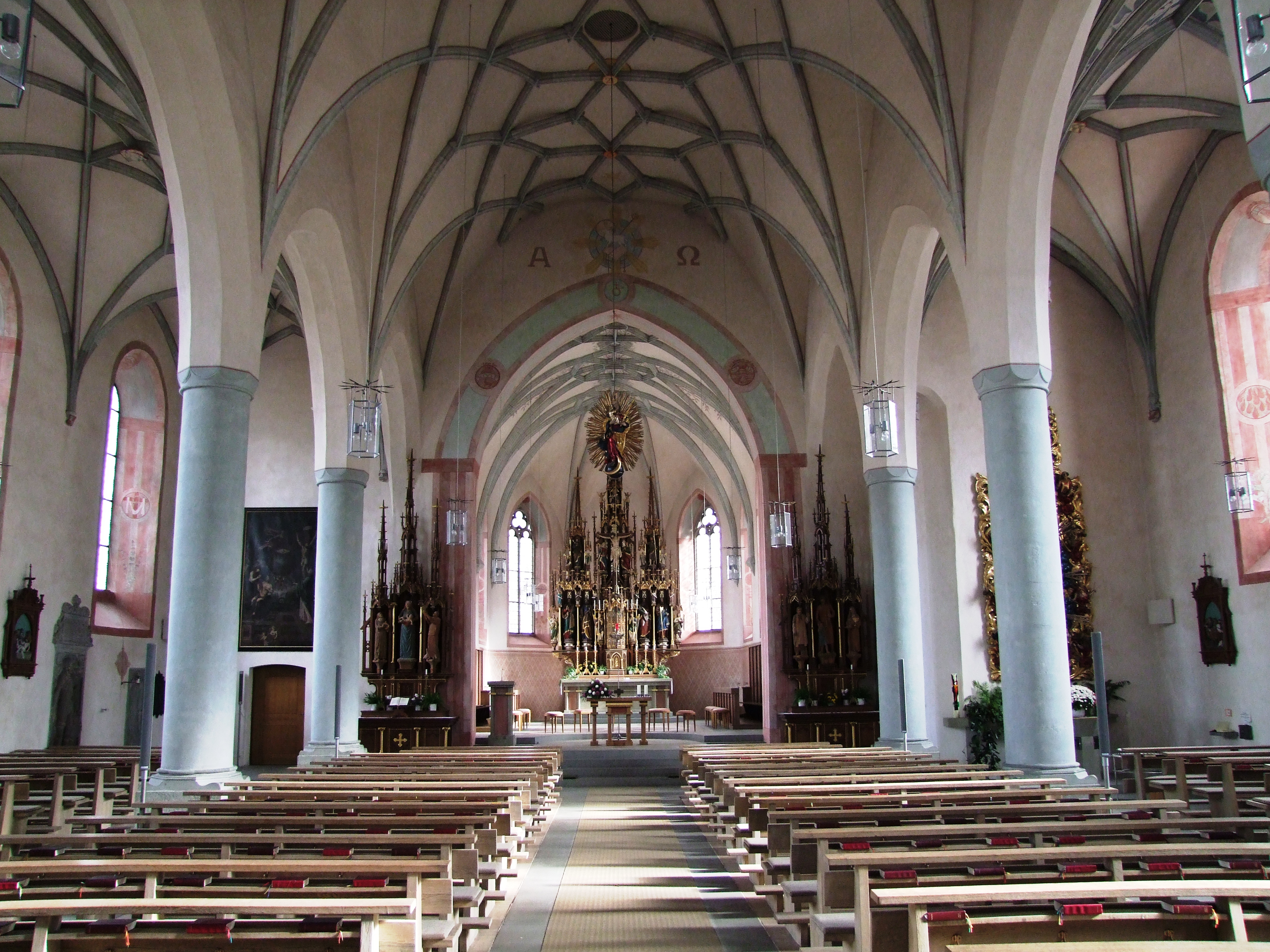 Pfarrkirche St. Philipp und Jakob im oberschwäbischen Bad Grönenbach